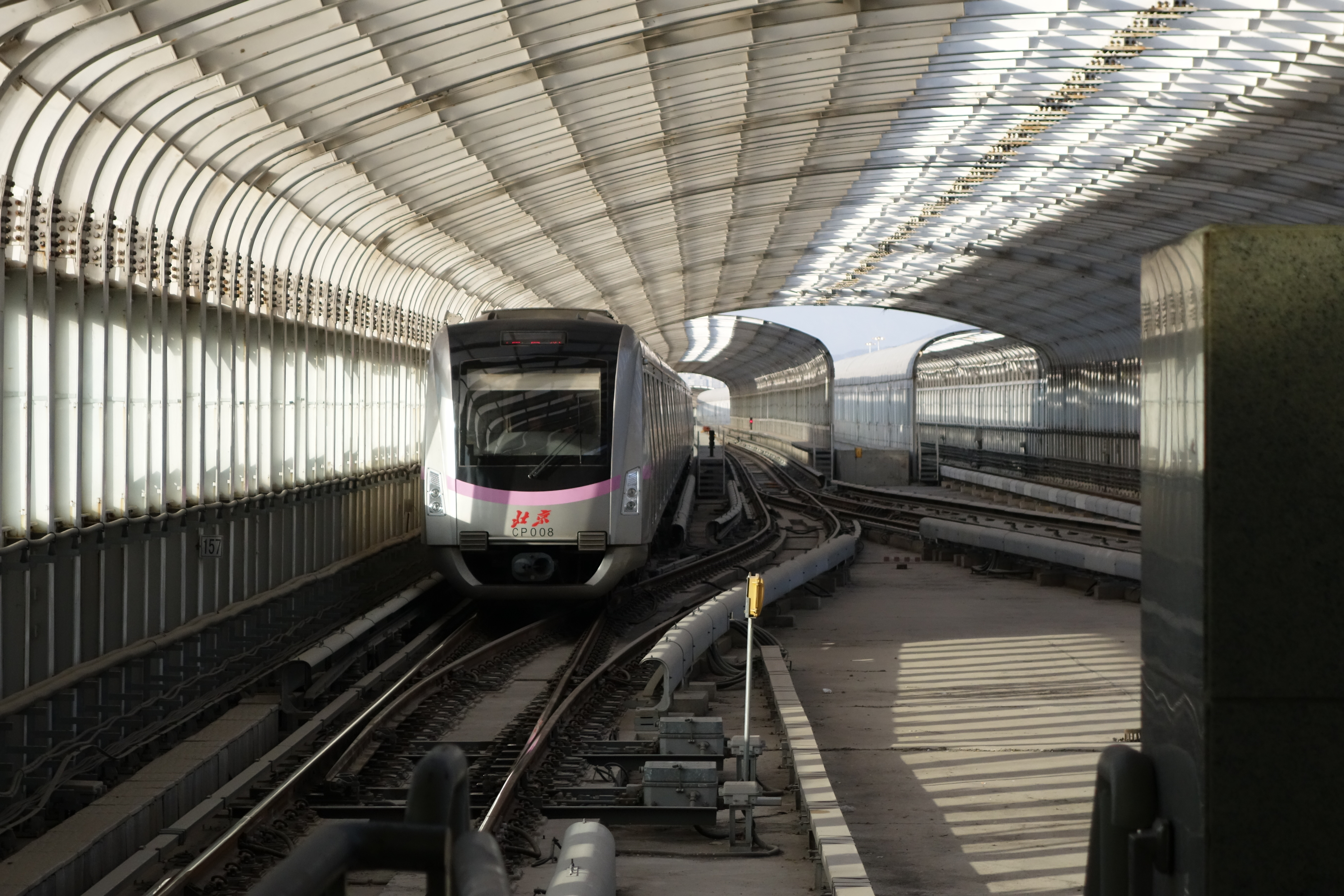 列车驶入沙河高教园区站